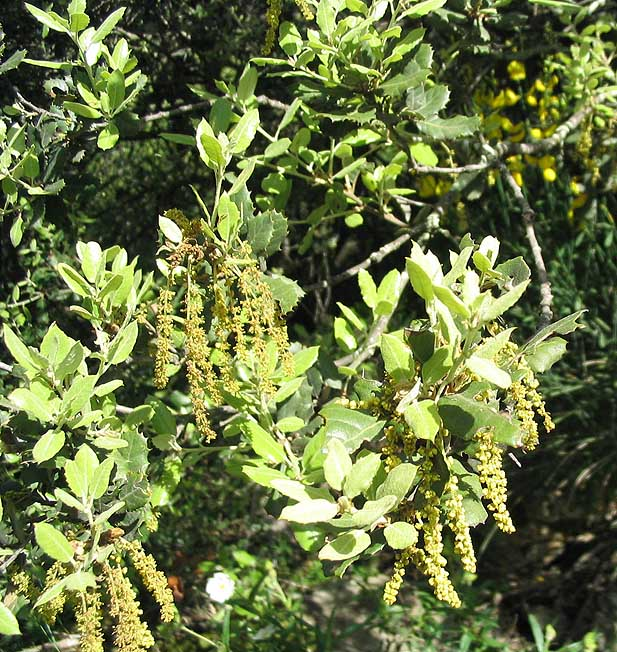 Chêne vert, inflorescences mâles Photo prise à Vinça le 24/05/04 Jean Tosti 10/2004